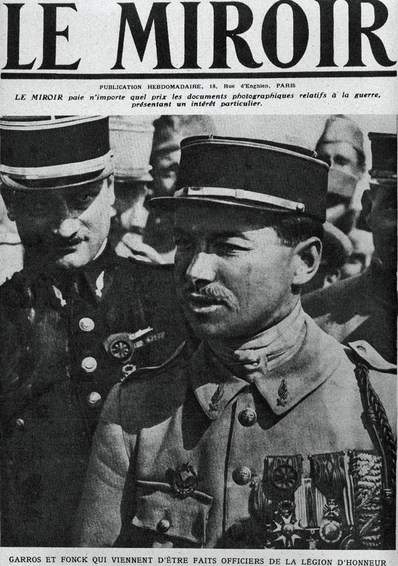 Le Miroir N°236_en couverture_Fonck_et_Garros.